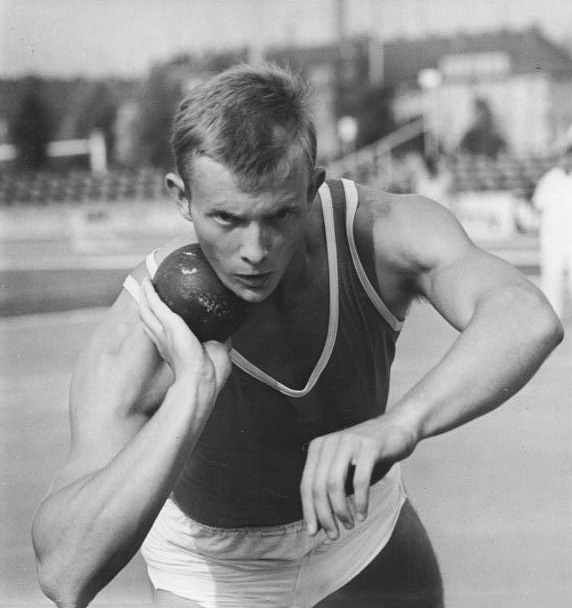 Max Klauss Zentralbild Schaar wen 28.07.1967 Halle: 18.Deutsche Leichtathletikmeisterschaften vom 27. bis 30.07.1967 (1.Tag) . Beim Kugelstossen schaffte Max Klauss (SC Einheit Dresden) 14,43 m. Information: Auf dem besten Wege zu einem neuen deutschen Zehnkampfrekord befindet sich Max Klauss, der sich an seinem 20. Geburtstag in blendender Form vorstellte. Nach fünf Disziplinen des ersten Tages (27.07.) verbluchte Max Klauss schon 4 350 Punkte.